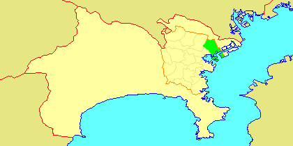 Map of Tsurumi-ku, Yokohama, Kanagawa-prefecture, Japan